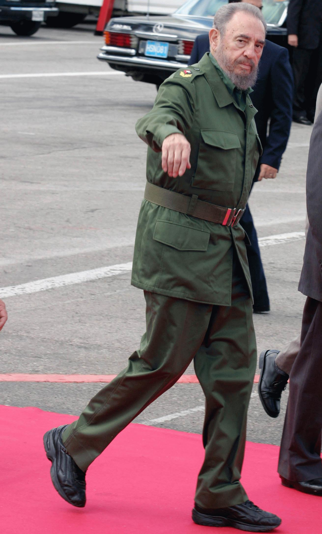 O líder cubano Fidel Castro — Brasilia.